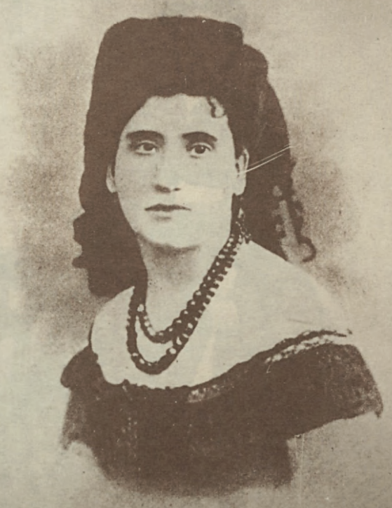 Agnese Trinci Murri, atriz italiana radicada em Salvador, Bahia, que foi a última amada do poeta brasileiro Antônio Frederico de Castro Alves, amor recíproco mas não correspondido.